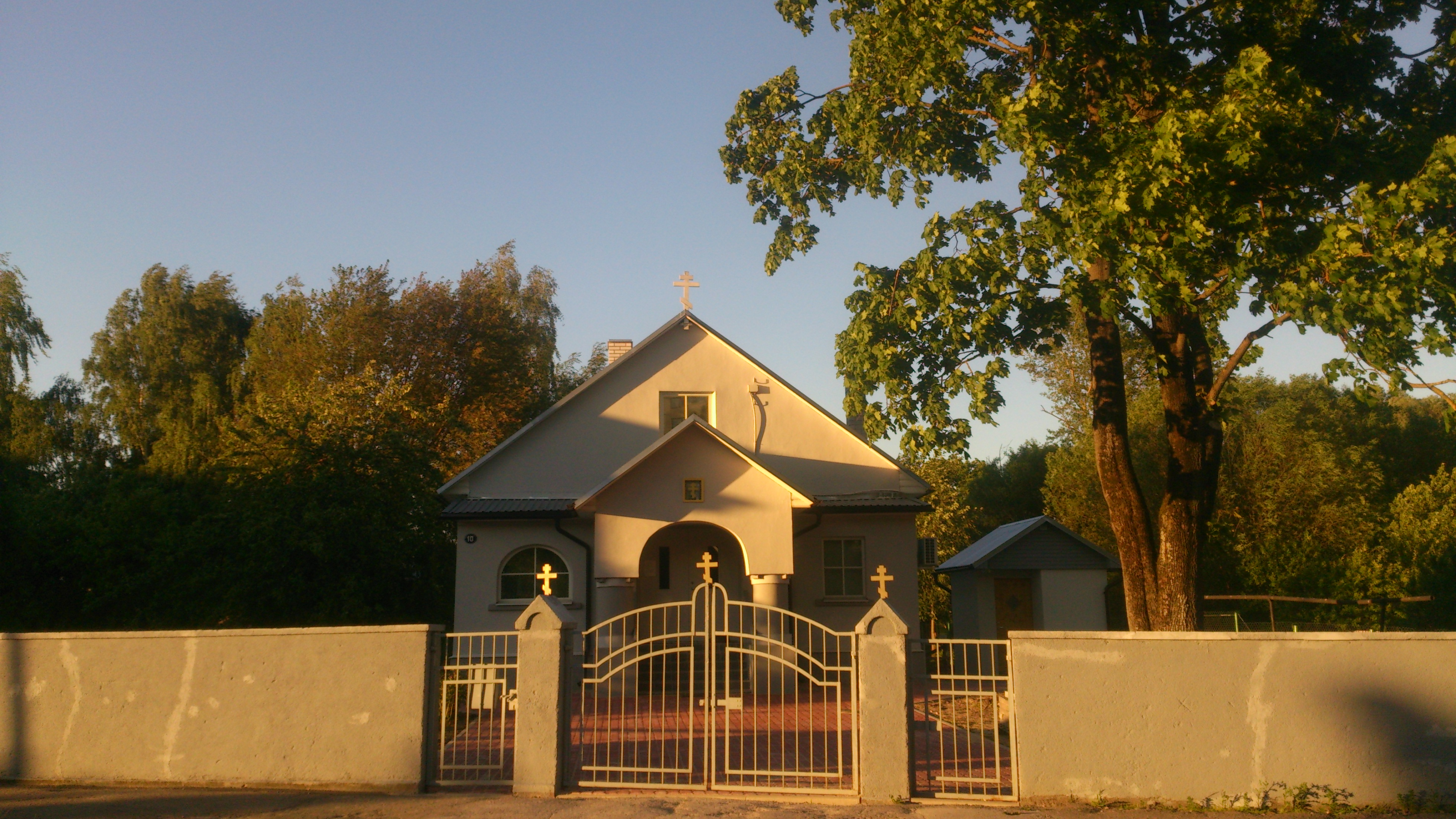 Vanausuliste palvemaja Põik tänaval